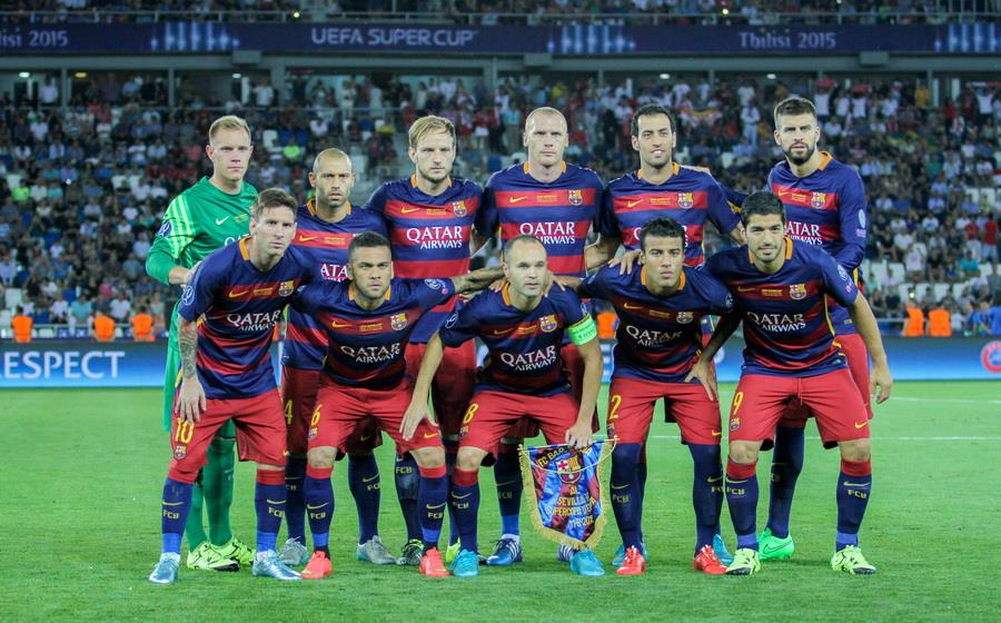 Матч за Суперкубок УЄФА 2015 року у Тбілісі. Грузія